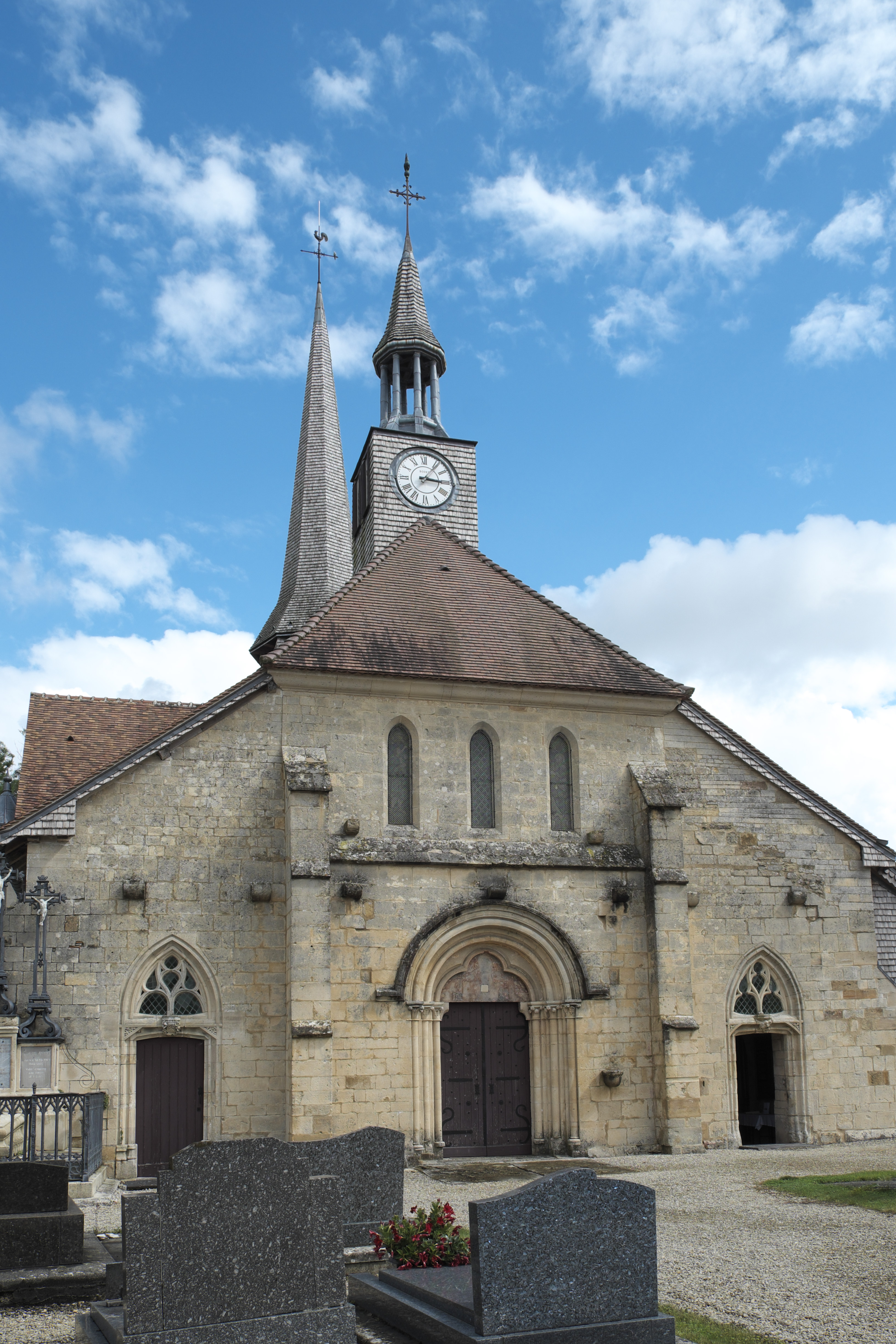 Katholische Kirche Notre-Dame-en-sa-Nativité in Puellemontier im Département Haute-Marne (Champagne-Ardenne/Frankreich), Westfassade .